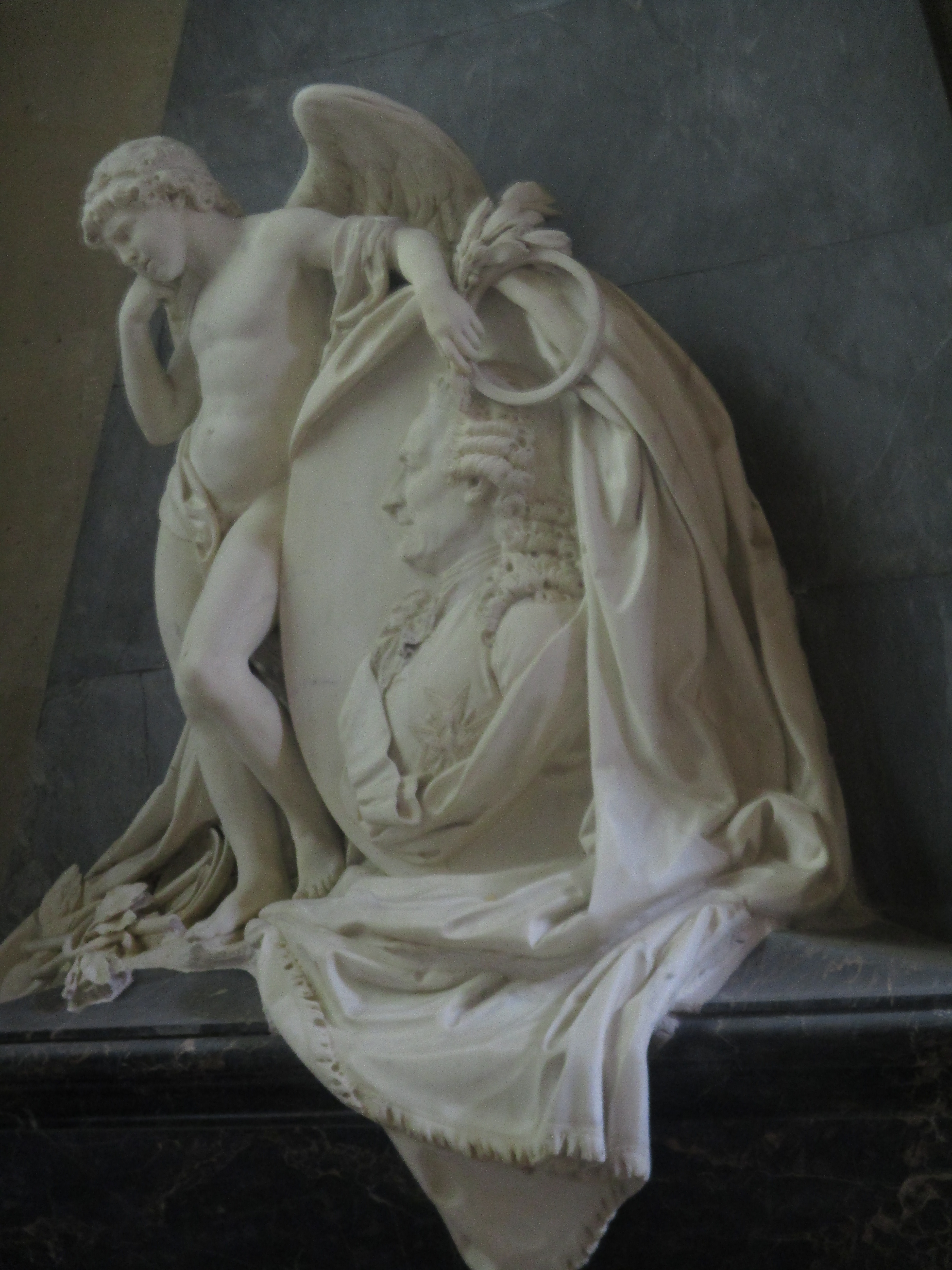 Monument funéraire de Vergennes en l'église ND de Versailles.